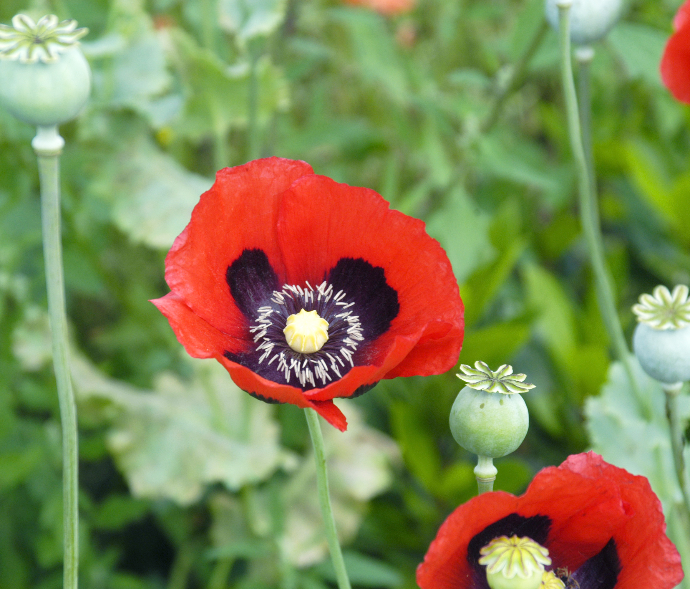 Papaver somniferum, (en) Opium Poppy